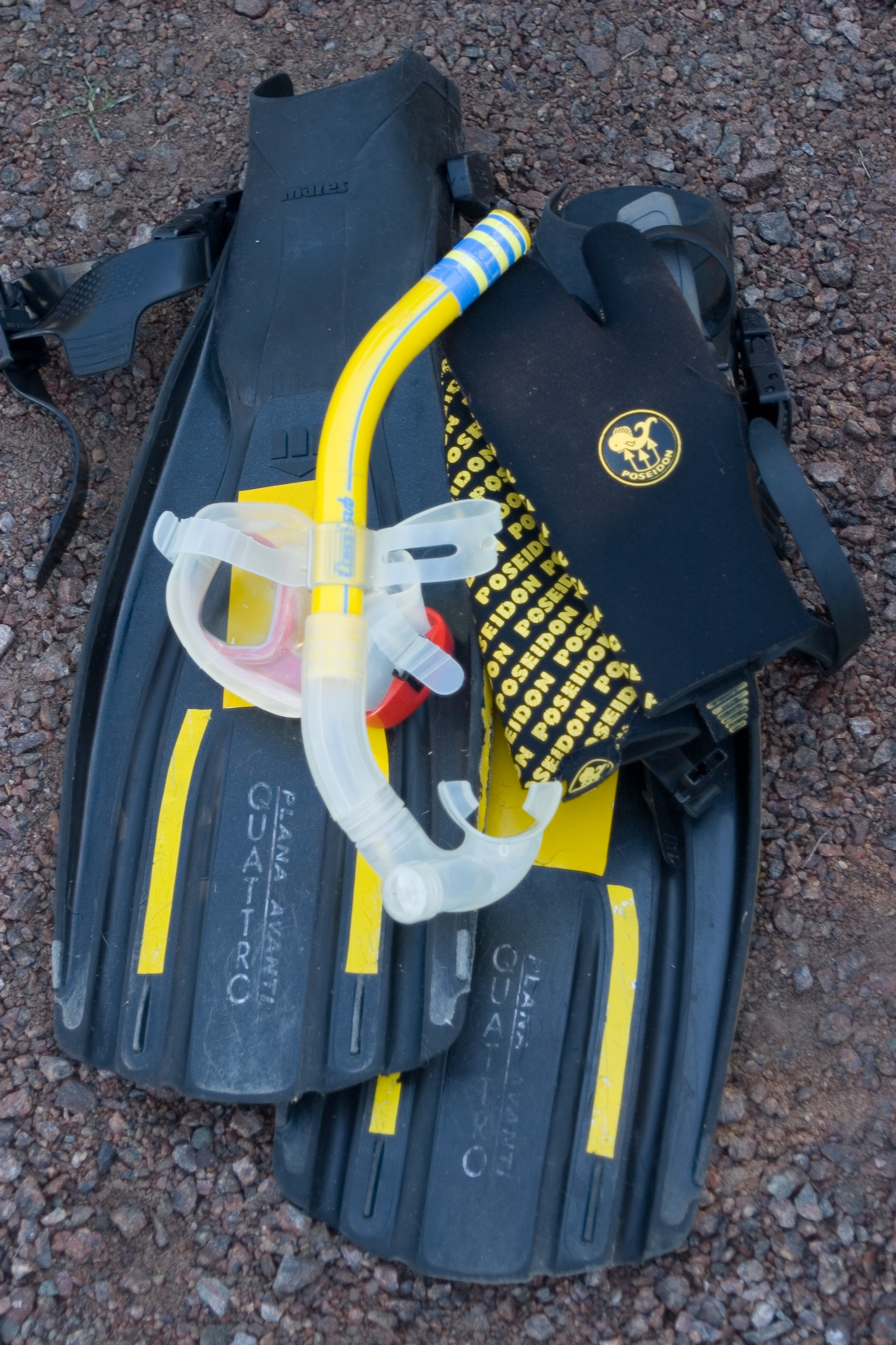 Snorkeling equipment: mask, fins, snorkel (additionally: gloves).050911_114008_1